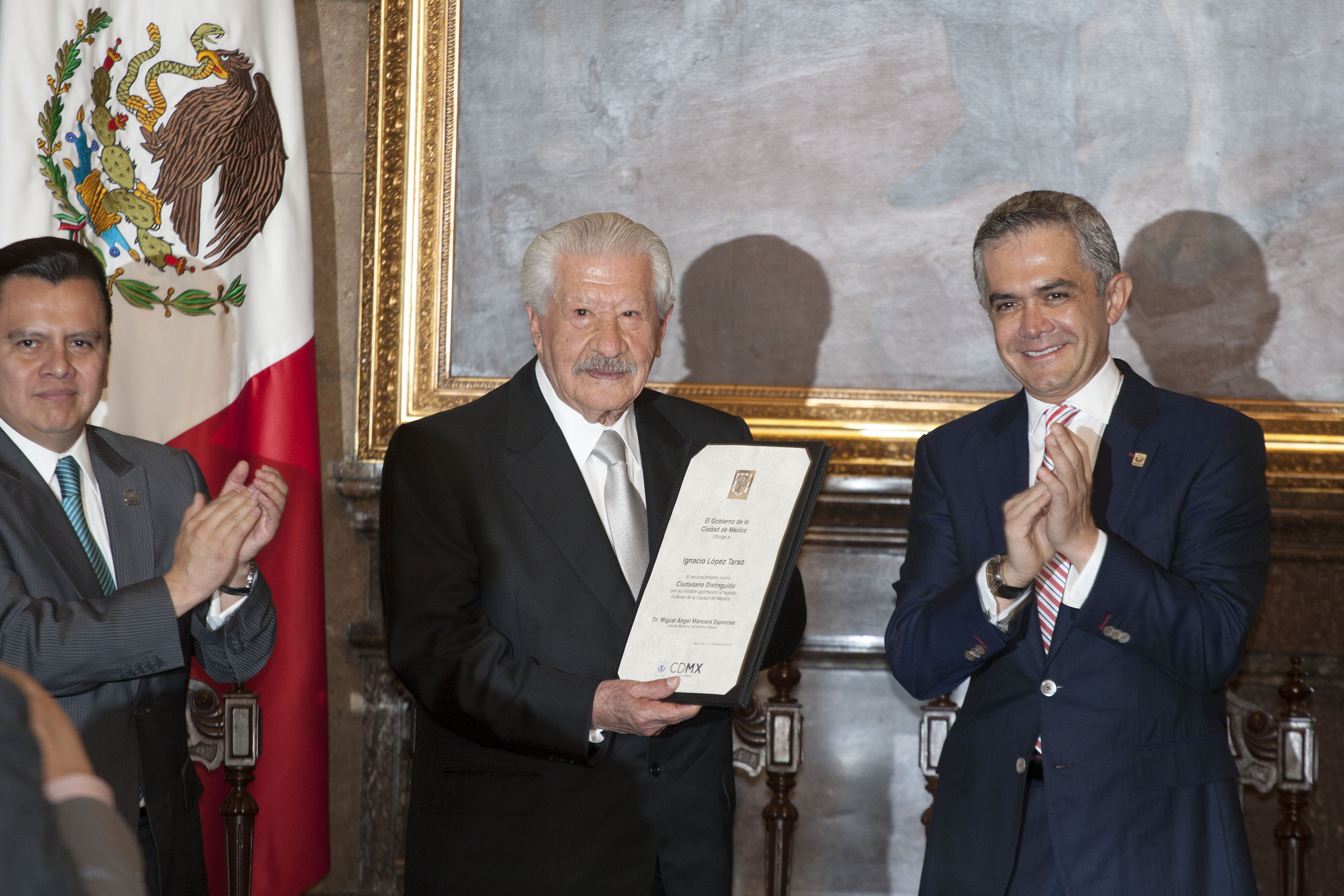 Viernes 27 de Febrero 2015. Homenaje al actor Ignacio López Tarso, el cual fue encabezado por el Jefe de Gobierno, Doctor Miguel Ángel Mancera, y el Secretario de Cultura CDMX, Eduardo Vázquez Martín, en el Salón de Cabildos de la Jefatura de Gobierno. Foto: Antonio Nava / Secretaría de Cultura CDMX.